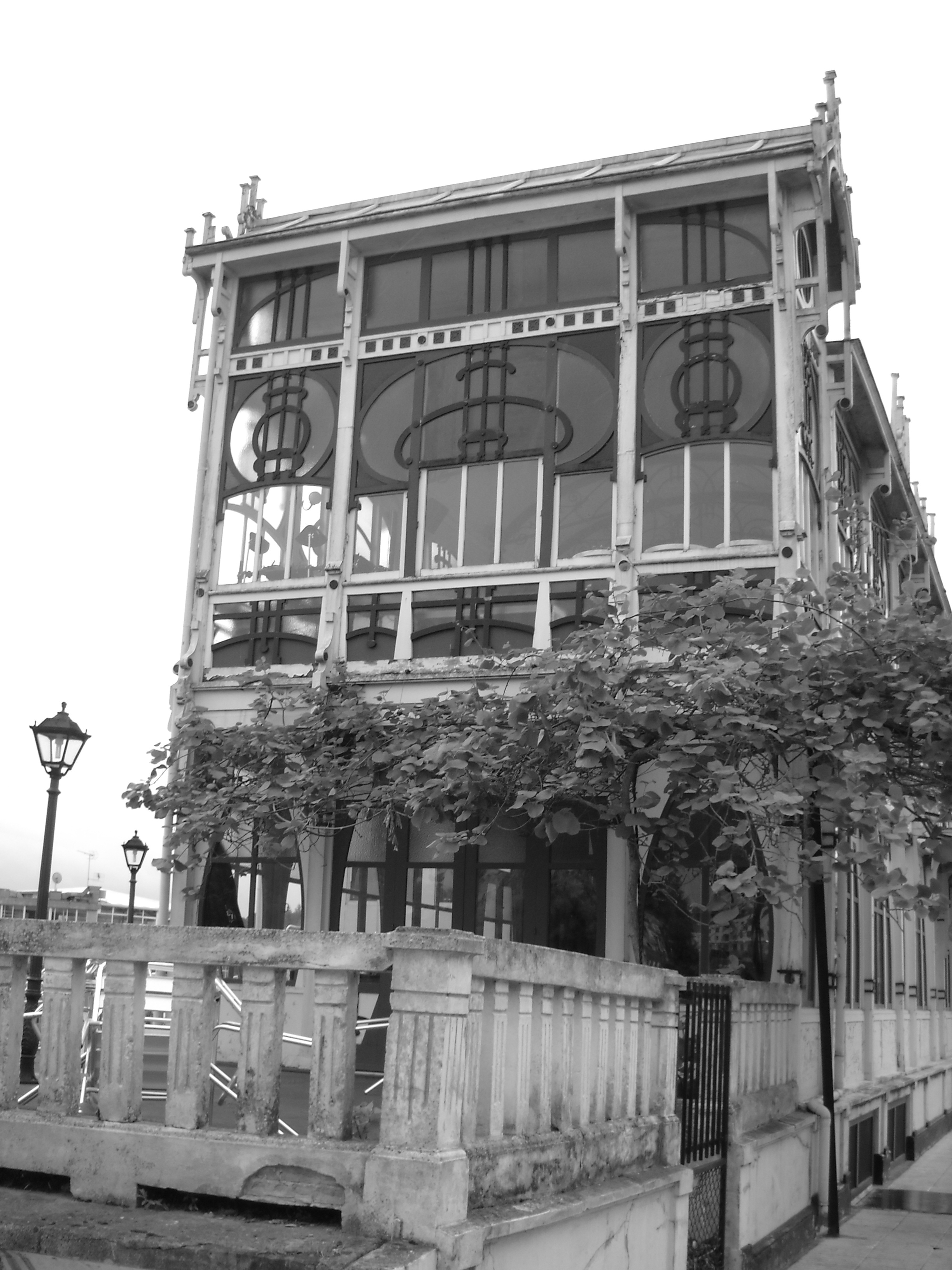 A Terraza, Sada, testeiro